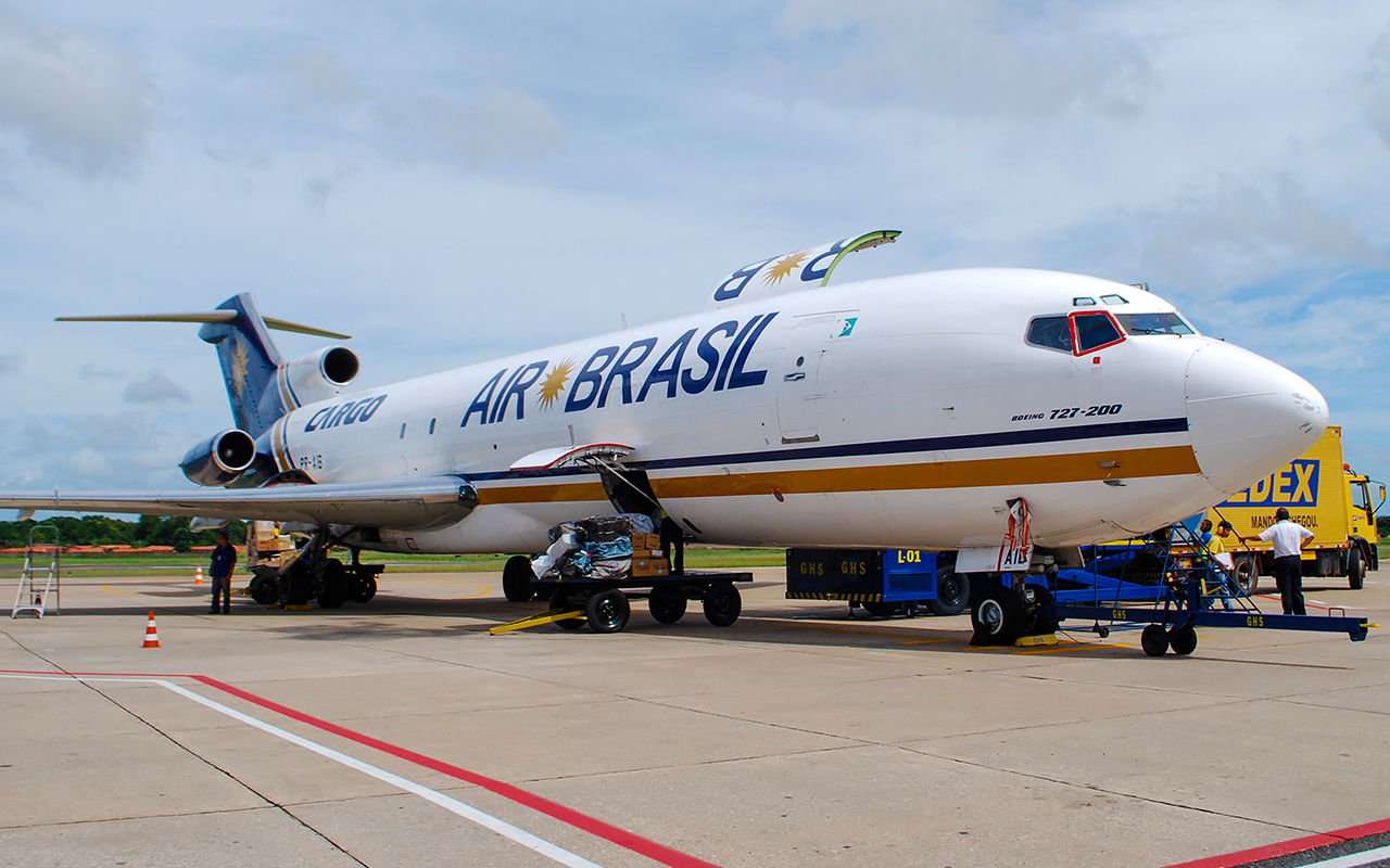 Fundada em janeiro de 2005 Encerrou atividades em março de 2012